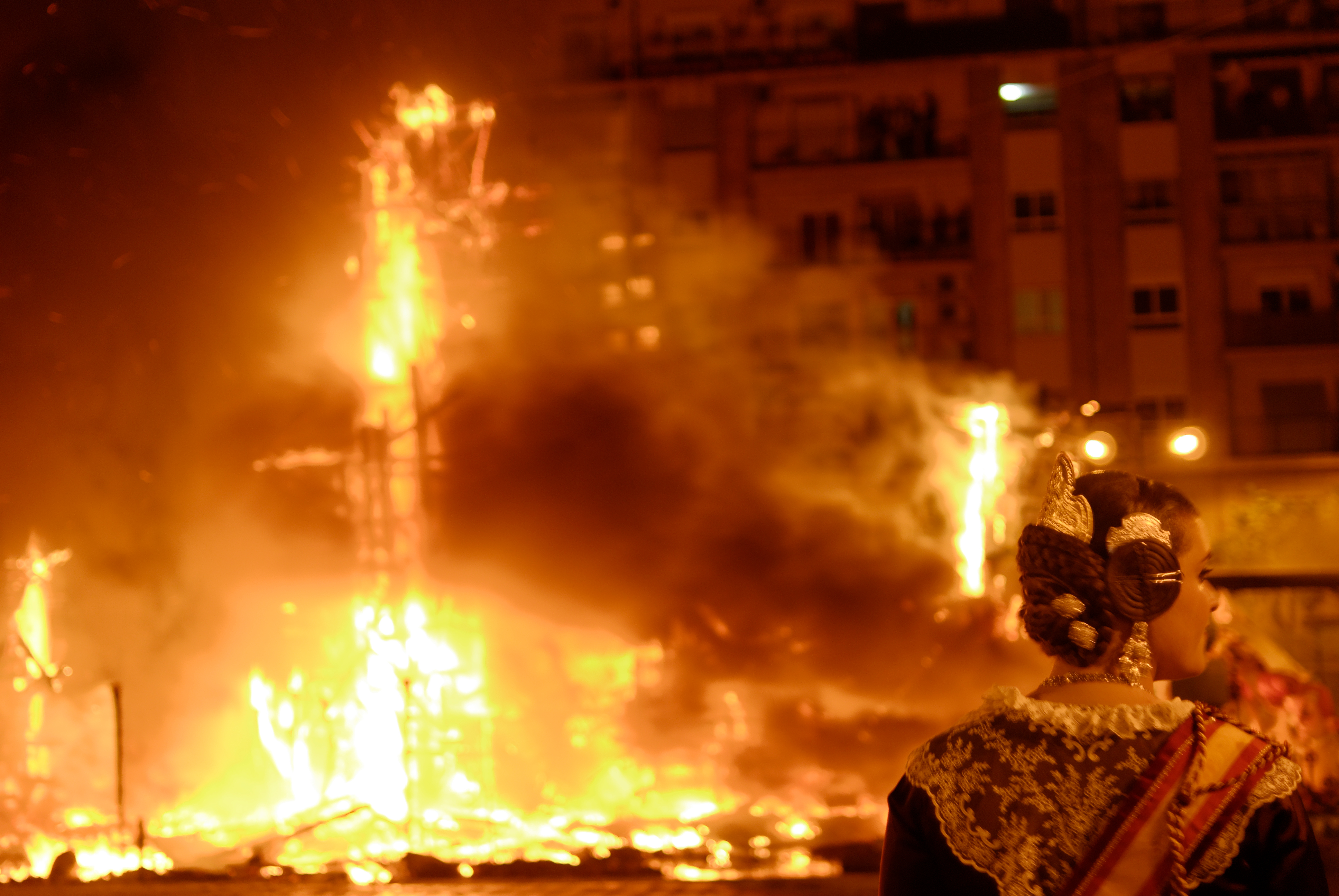 Una fallera, durante la cremà de su falla.